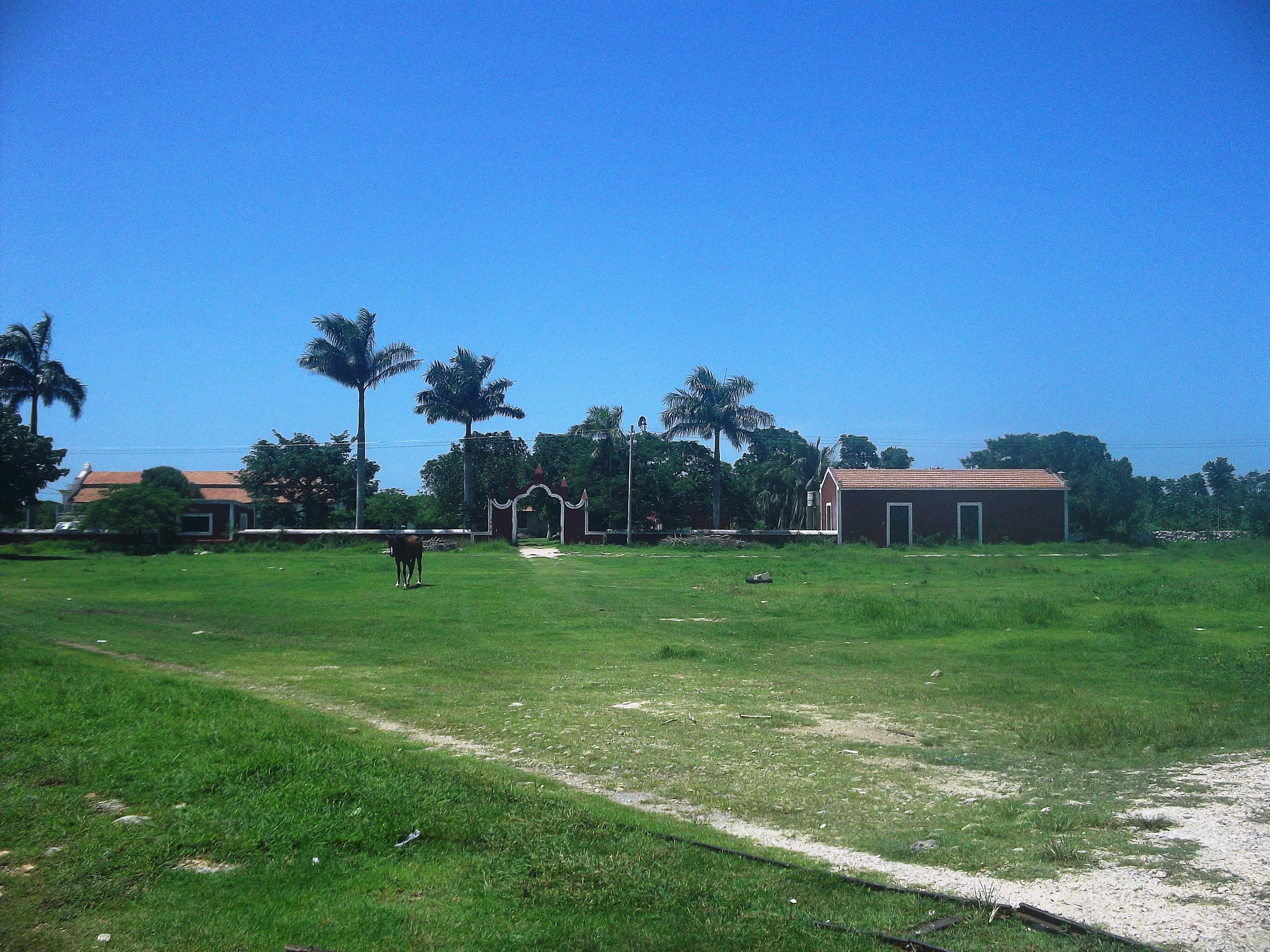 Vista de la hacieda San Eduardo, Yucatán.